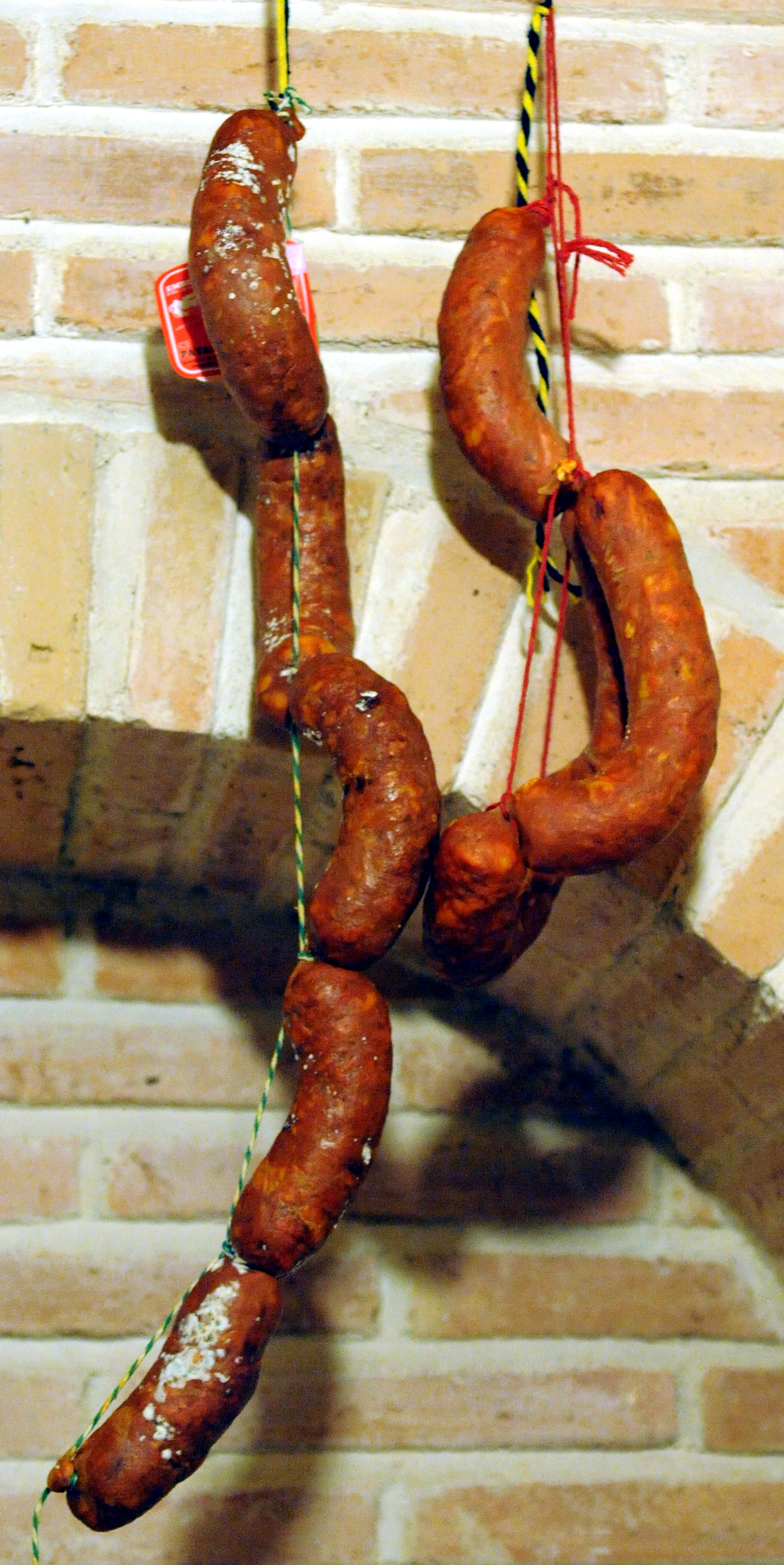 Patateras en ristra de Ceclavín: dulces y picantes.